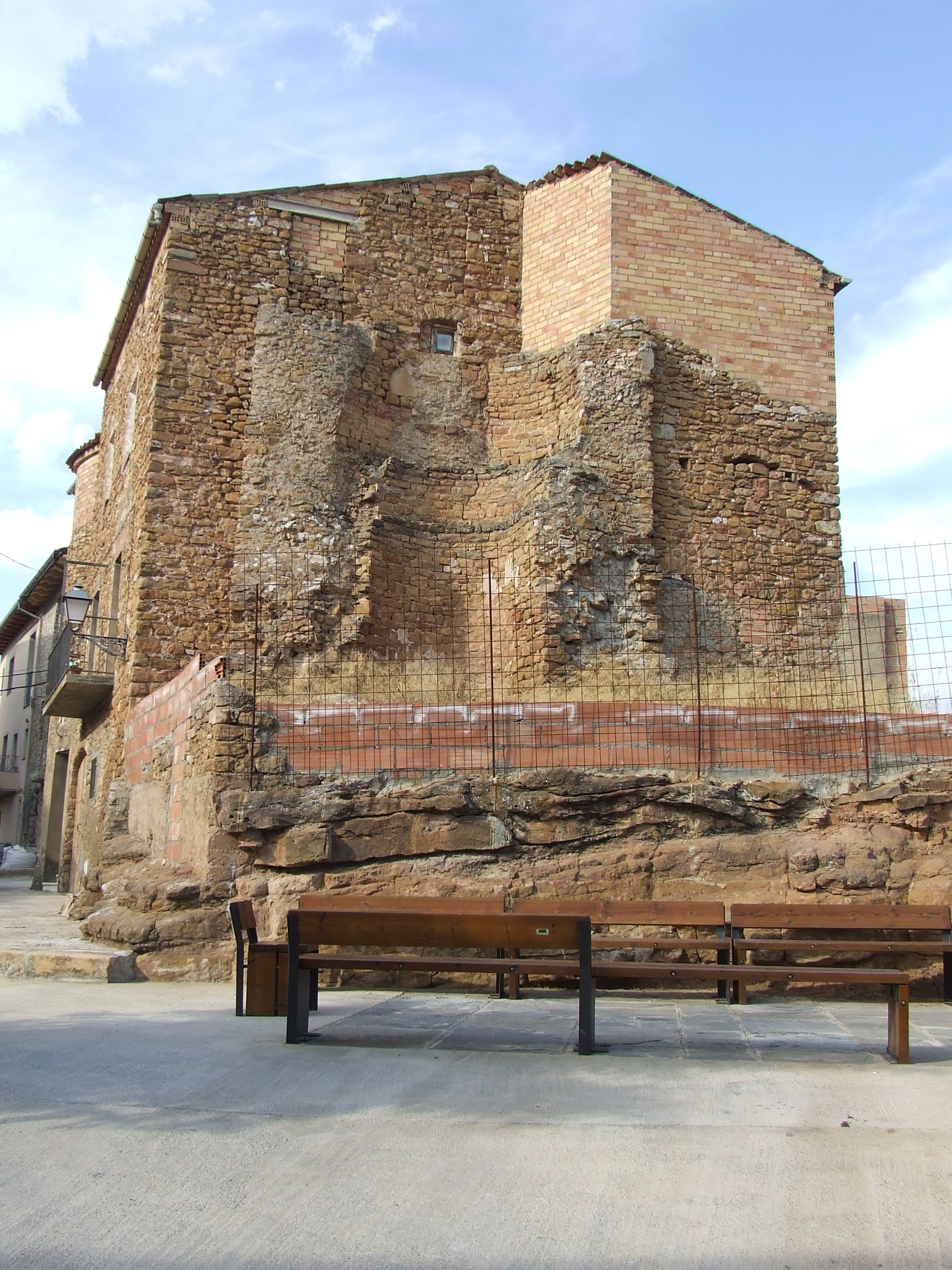 Torre de la Presó (Talarn, Pallars Jussà)